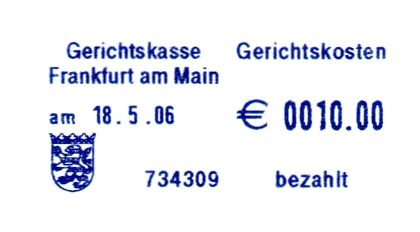 Abdruck eines Gerichtskostenfreistemplers.